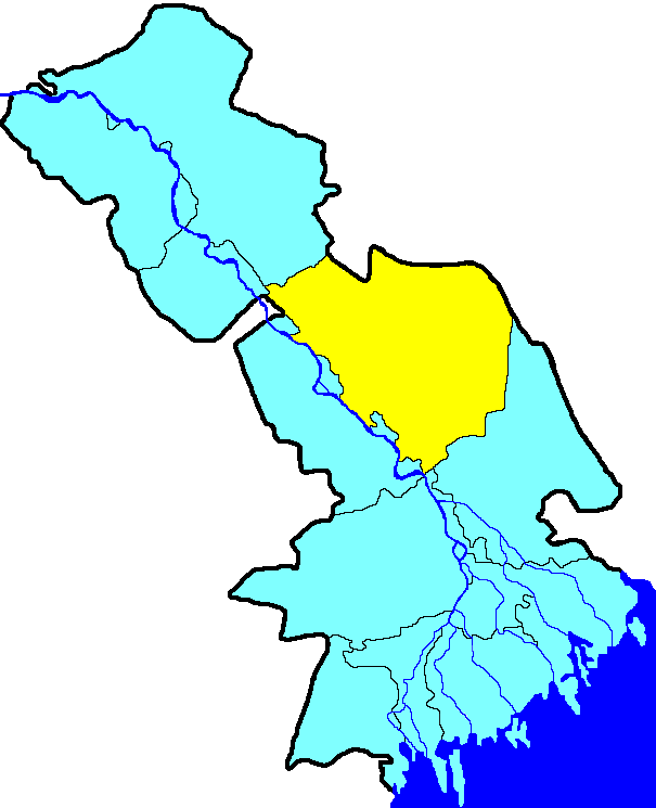 Хараблинский район на карте Астараханской области